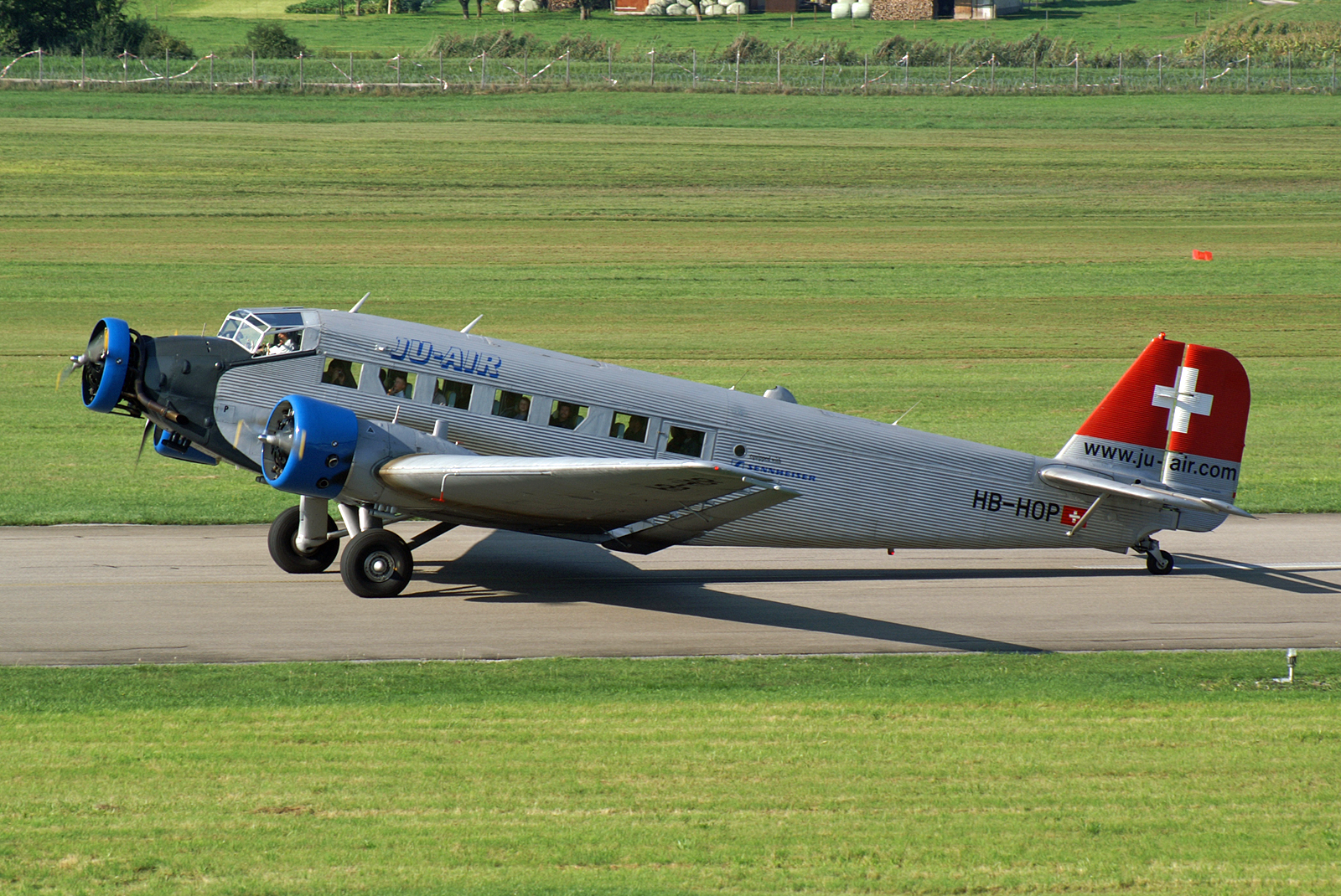 Bern - Belp (Belpmoos) (BRN / LSZB) Schweiz - Switzerland 9.2005